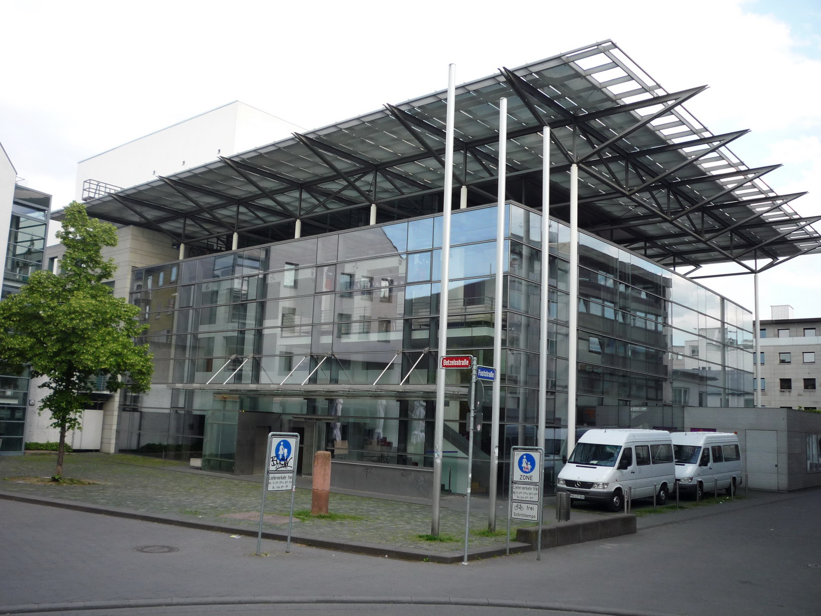 Staatstheater Kleines Haus